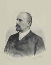 Alfred Skene II. (1849 - 1917), Rakouský šlechtic a politik z Moravy